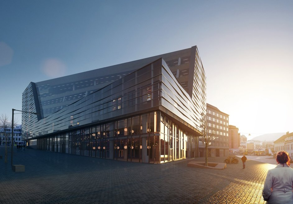 Jonsvollskvartalet, Bergen.